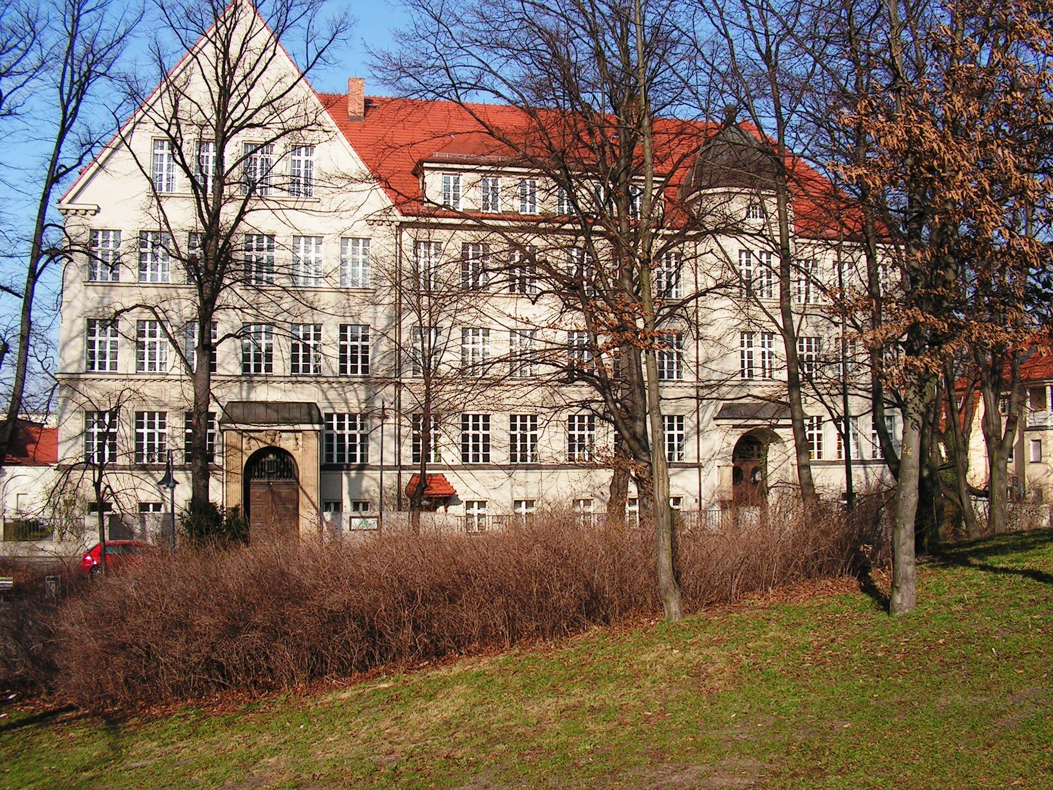 ehemalige Augusta-Schule, heute Konservatorium, in Cottbus, Puschkinpromenade 13/14; unter Denkmalschutz